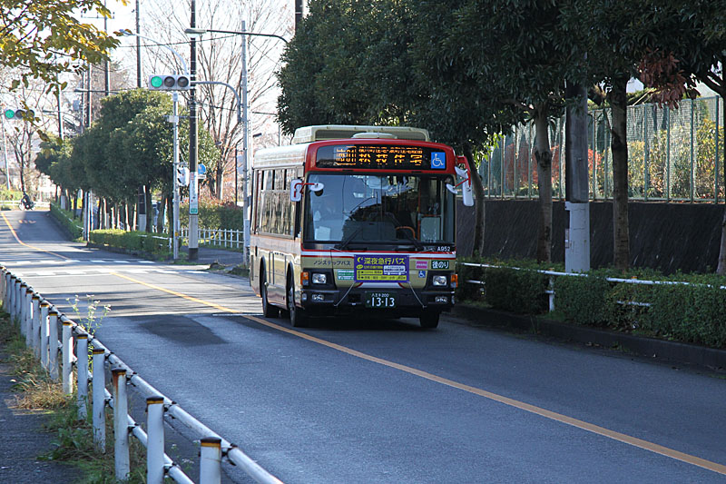 Nishi Tokyo Bus route "Shi01" 西東京バス 市01系統